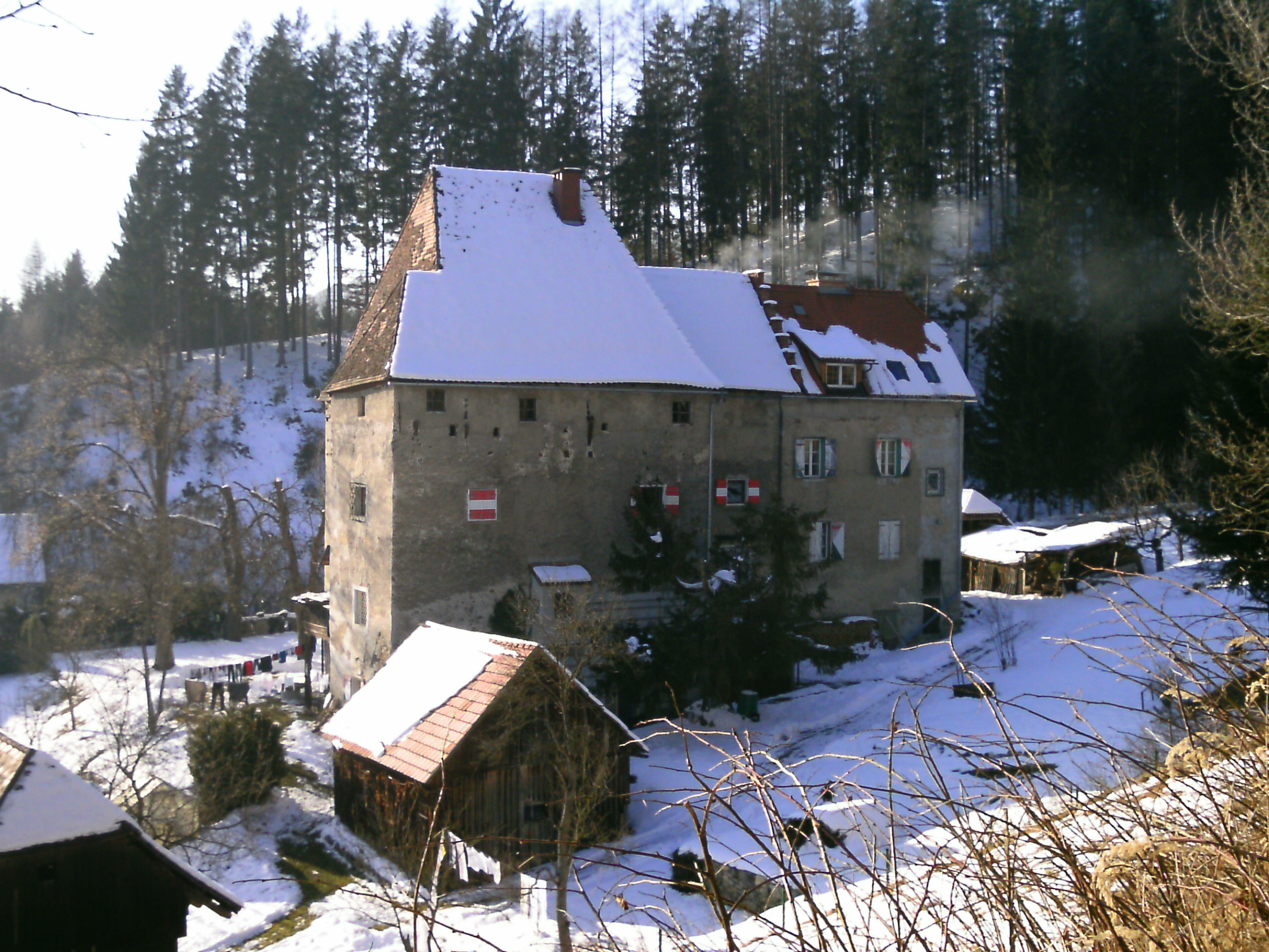 Schloss Hart am Harter Graben Kindberg/Österreich.